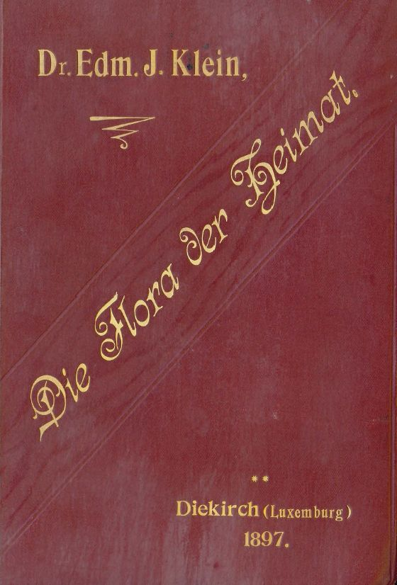 Titelblad vun : Flora der Heimat.